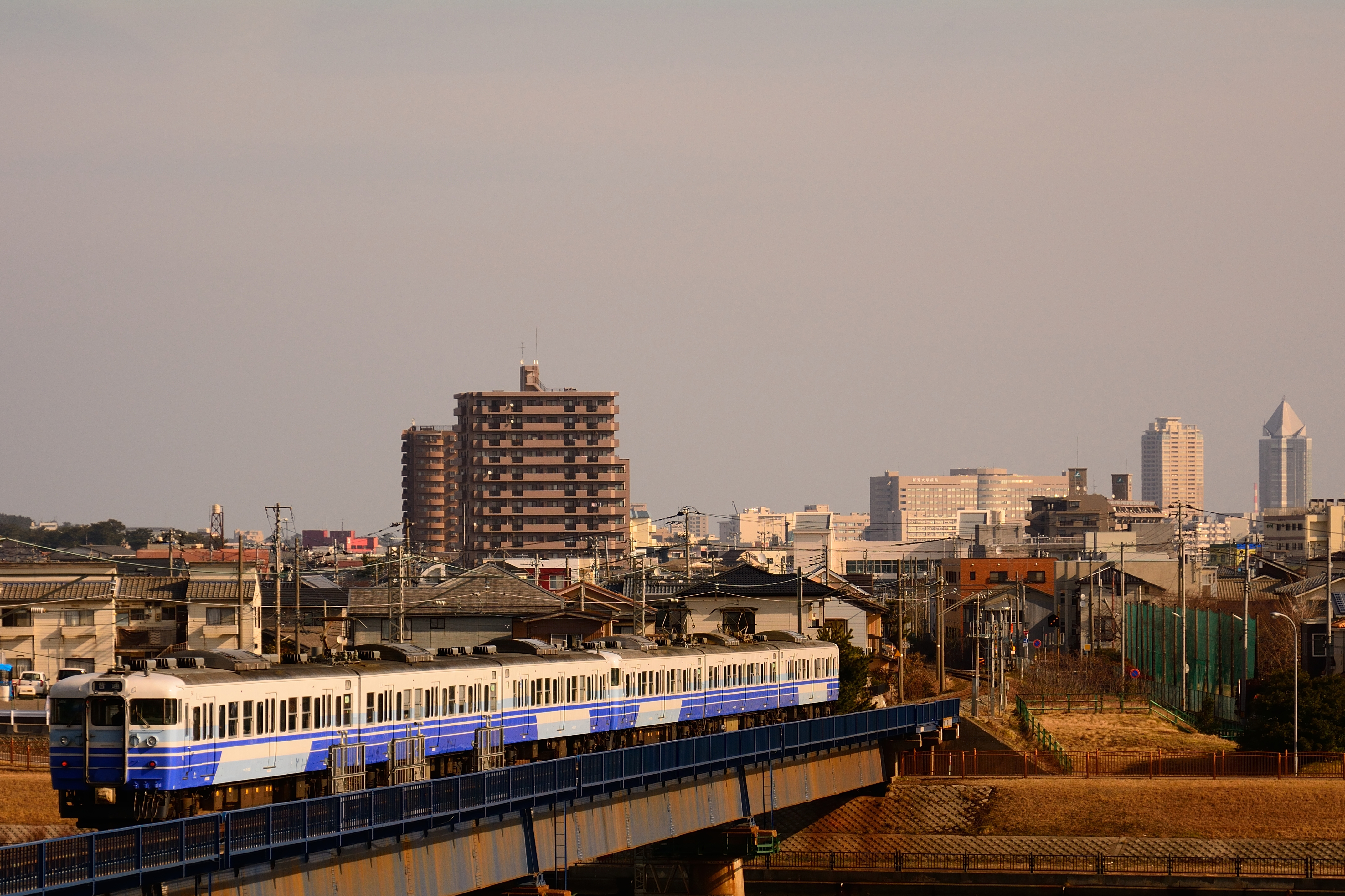 越後線（青山ー関屋間）